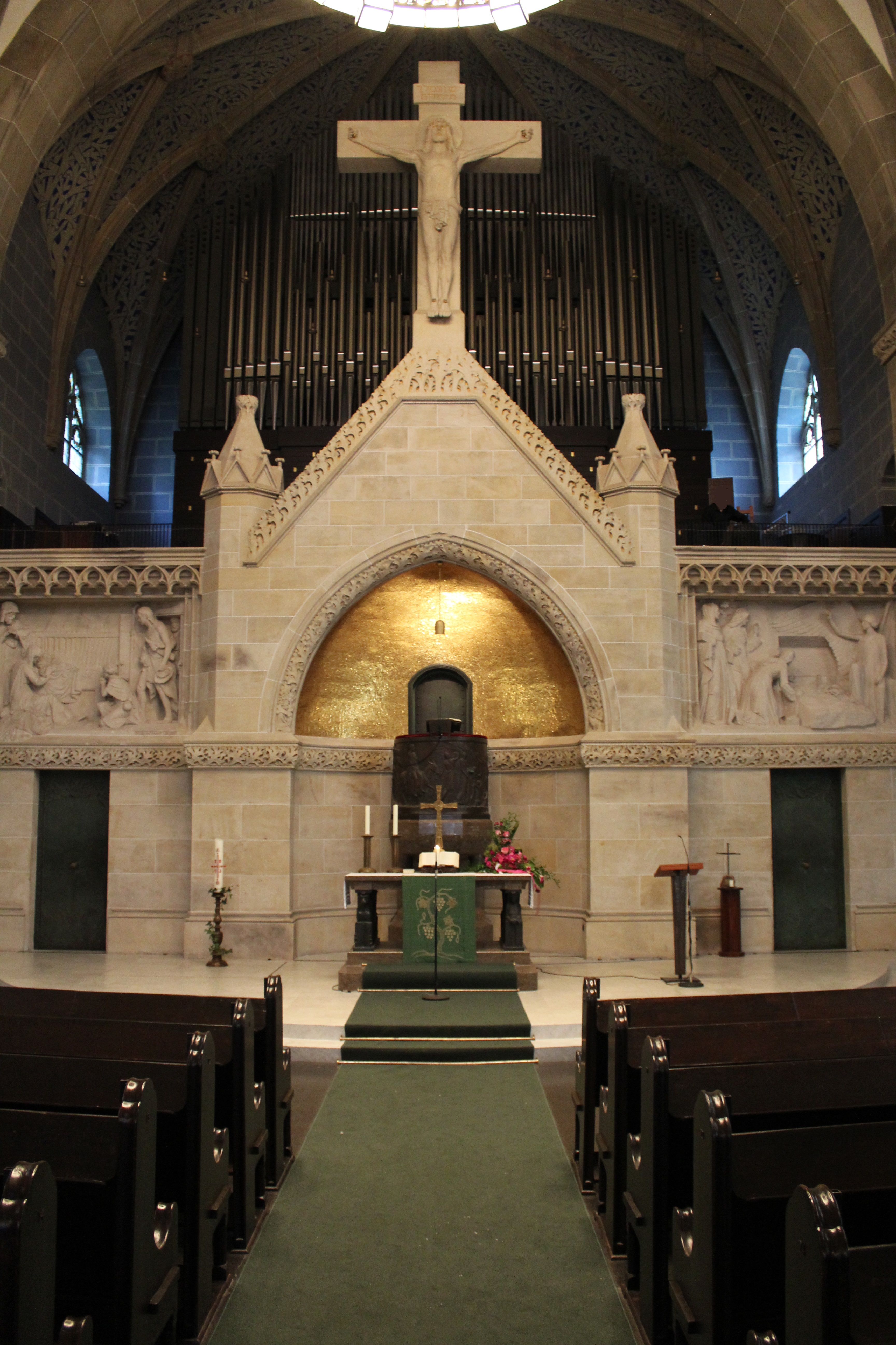 Christuskirche Karlsruhe, Chor mit Altar, dahinter die erhöhte Klaisorgel